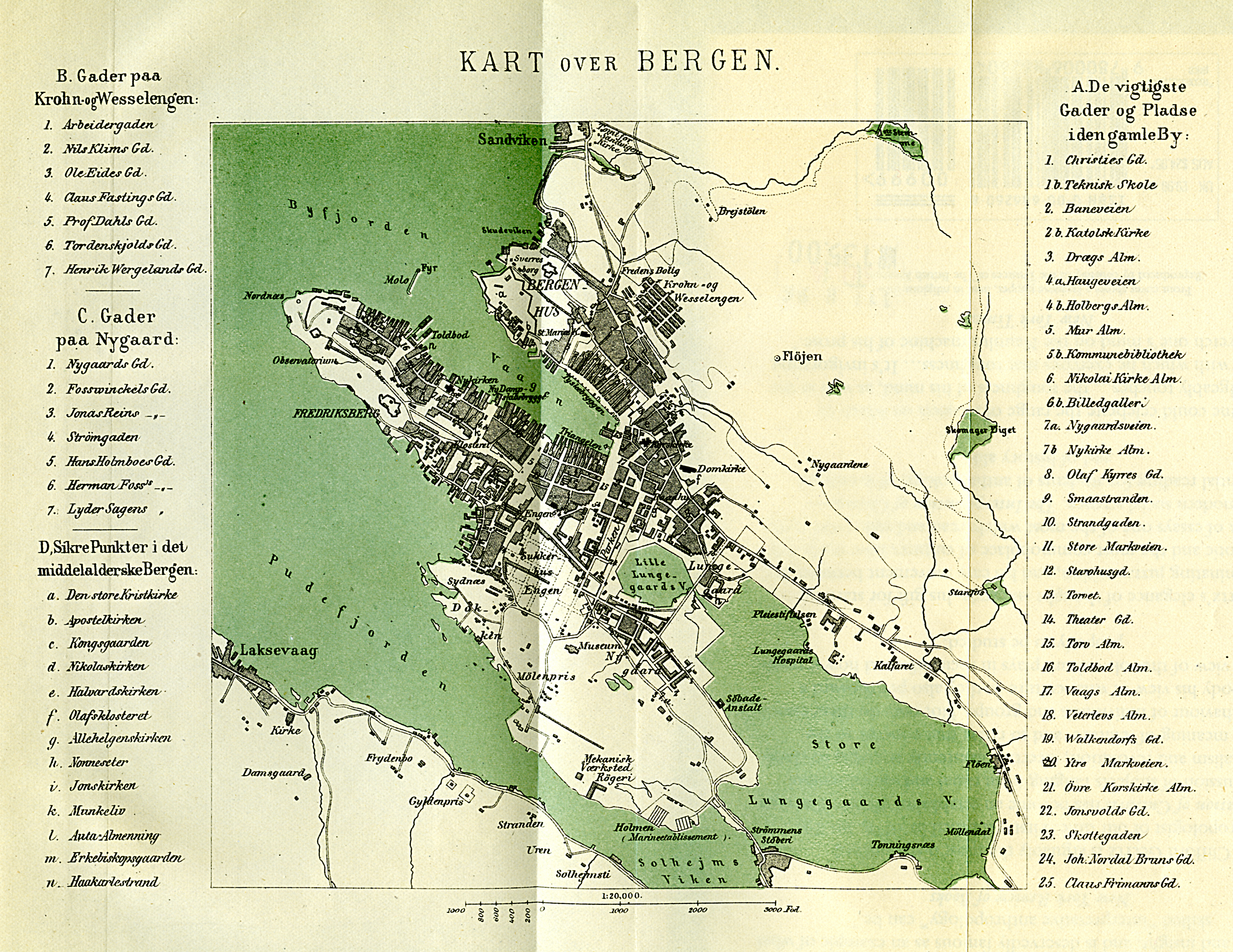 Map from Bergen 1877.